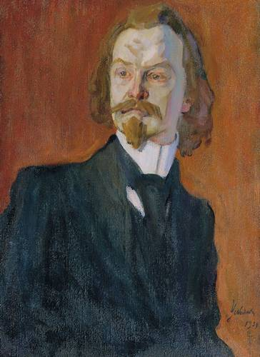 Портрет Константина Дмитриевича Бальмонта. Автор Николай Павлович Ульянов. 1909 год.